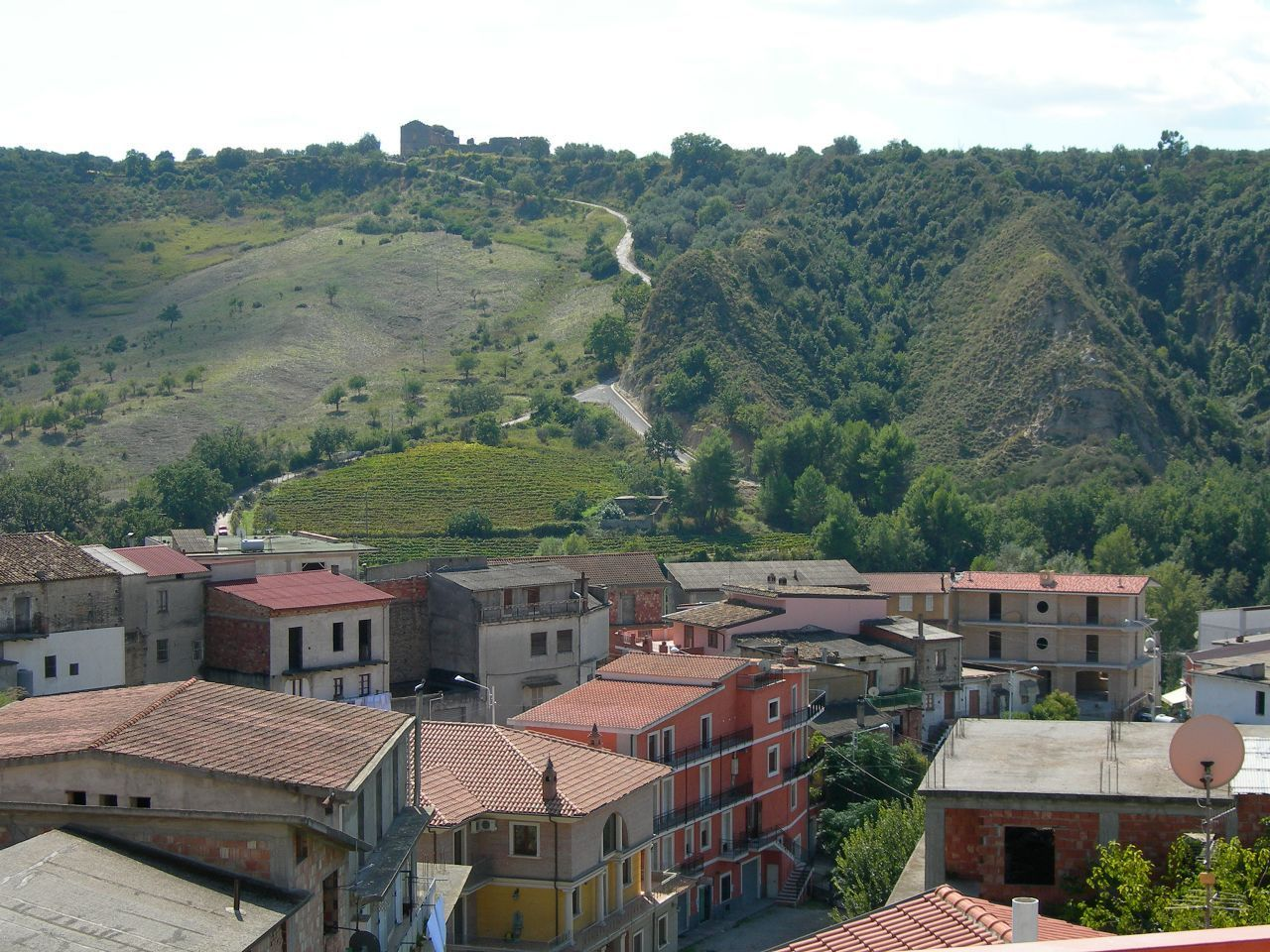 goodson, goodson, convento, libera